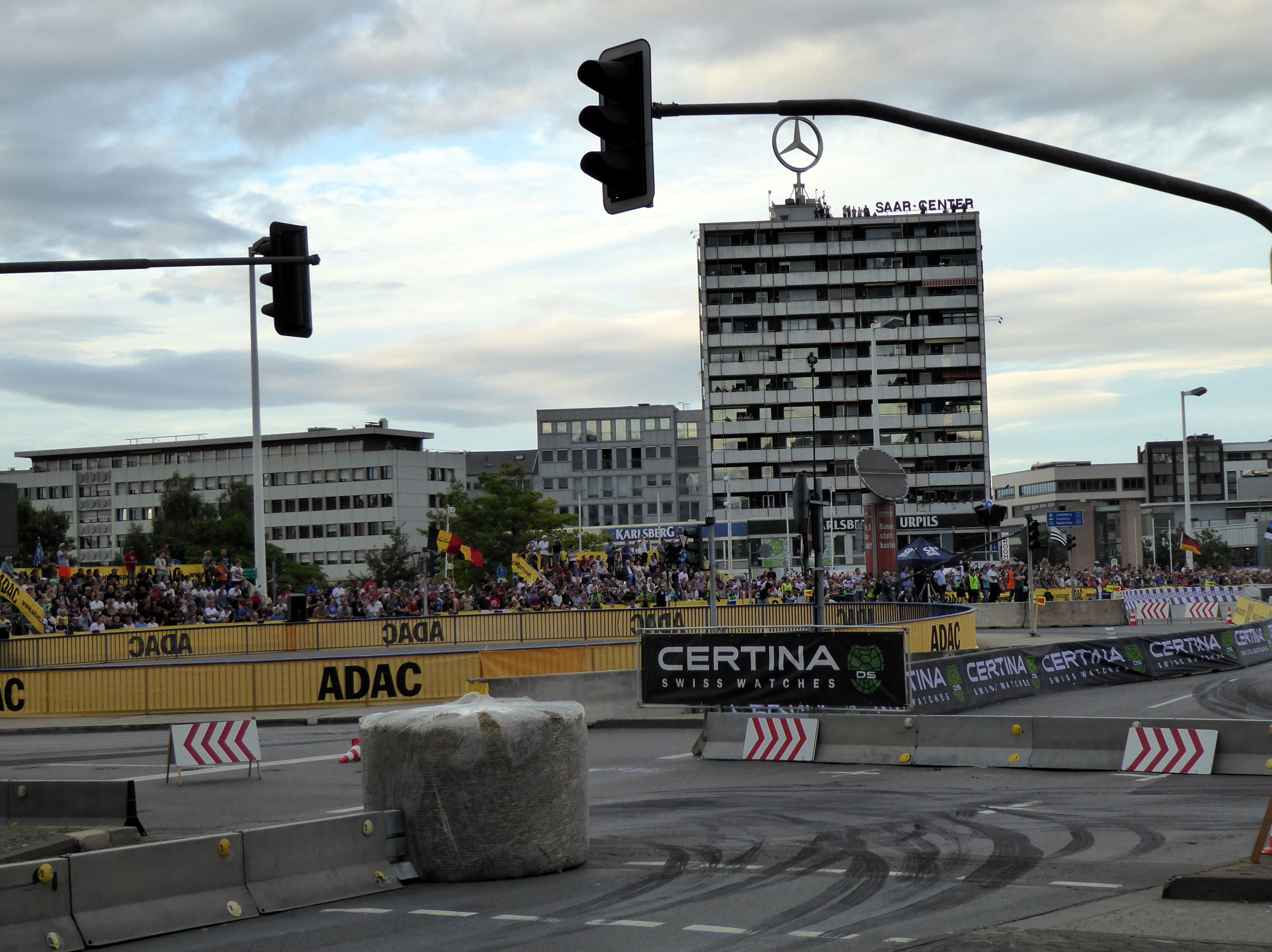 Rallye Deutschland 2017, Super Special Stage 1 auf der Wilhelm-Heinrich-Brücke in Saarbrücken